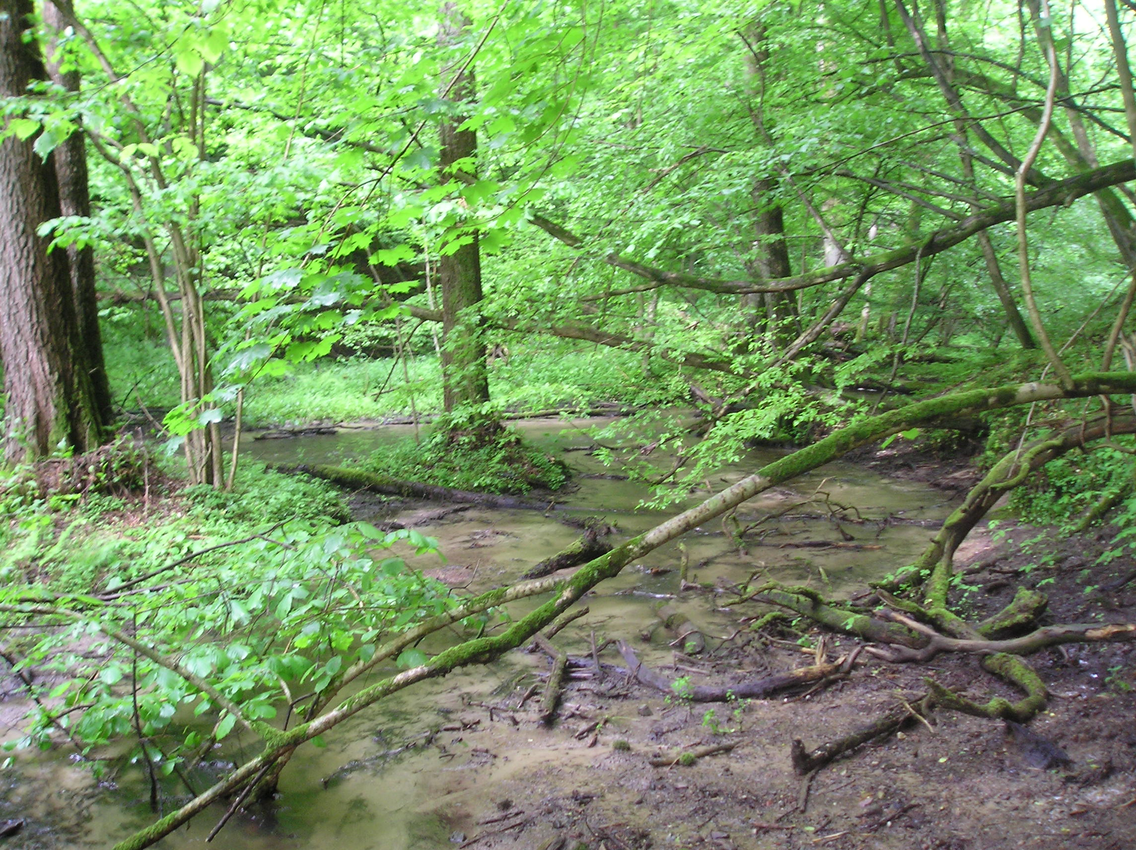 Rezerwat Przyrody Jar Brynicy Górznieńsko-Lidzbarski Park Krajobrazowy